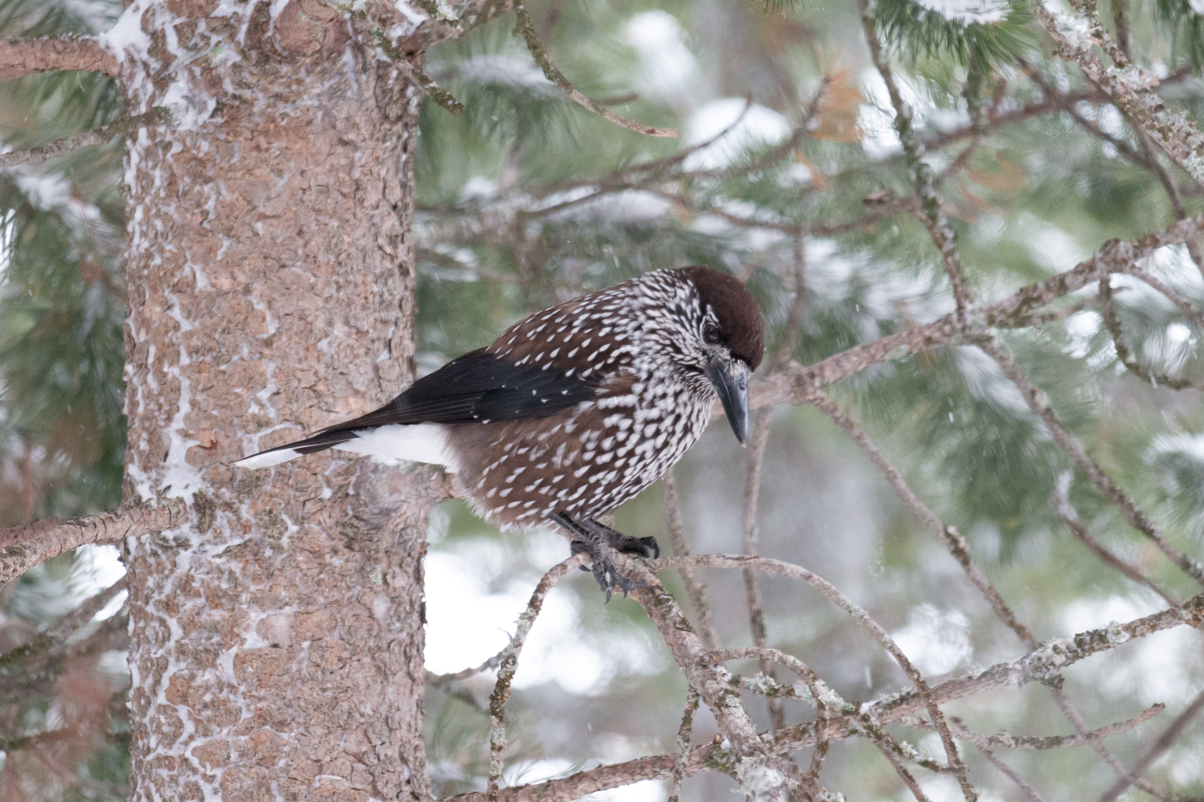 Cassenoix moucheté (Nucifraga caryocatactes) au bord des pistes de ski sur le domaine skiable de les Arcs Peisey Vallandry